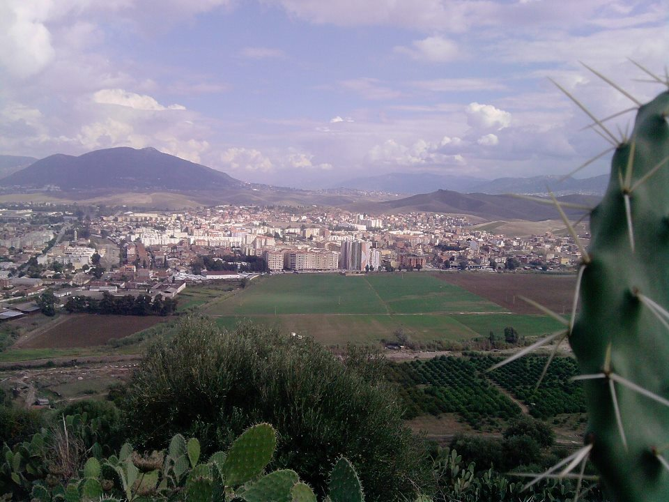 Draa Ben Khedda (Mirabeau) vue de Mouldiouane